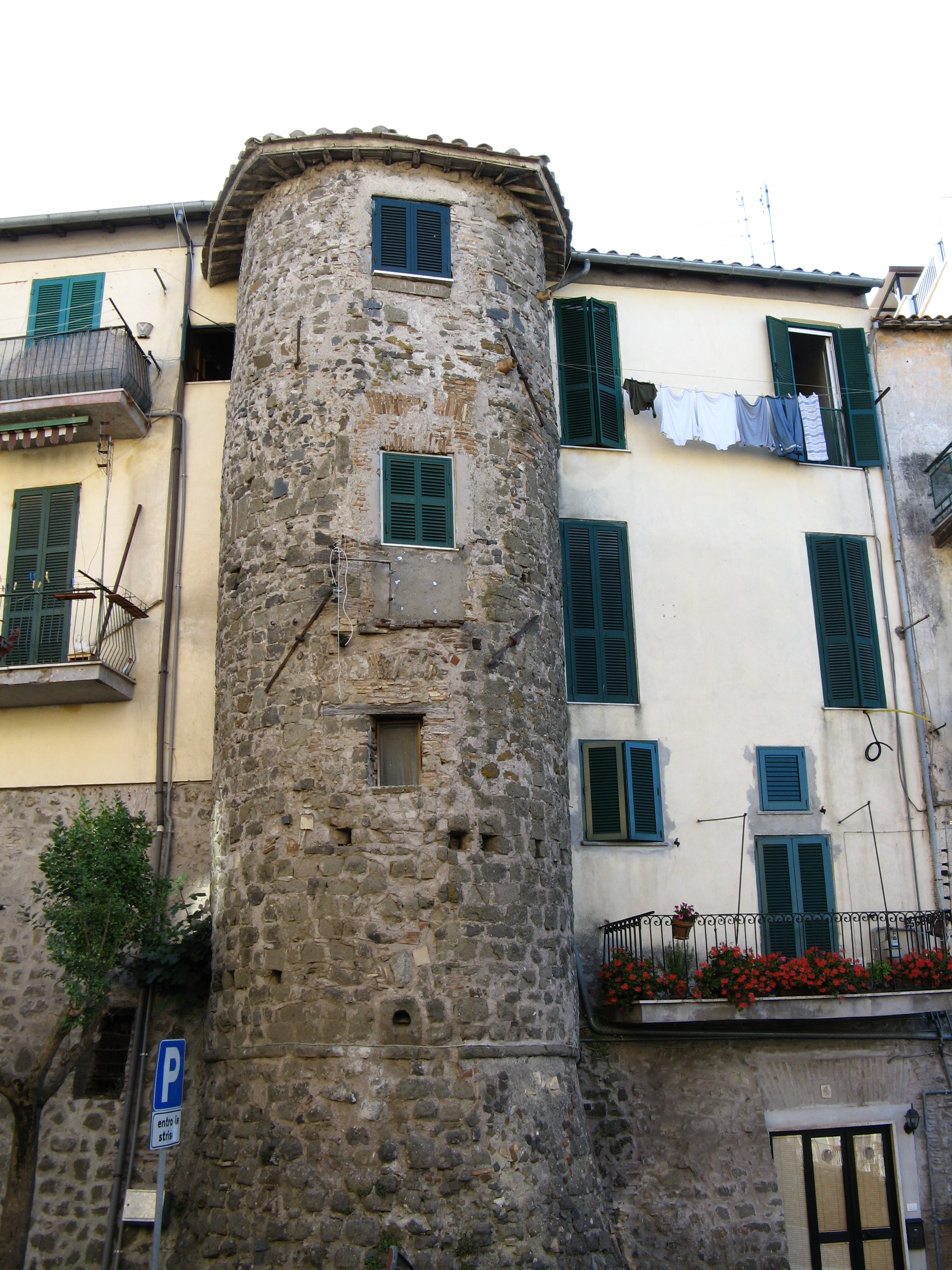 Genzano di Roma, Torre Saracinesca, Torrione delle antiche mura del XIII secolo